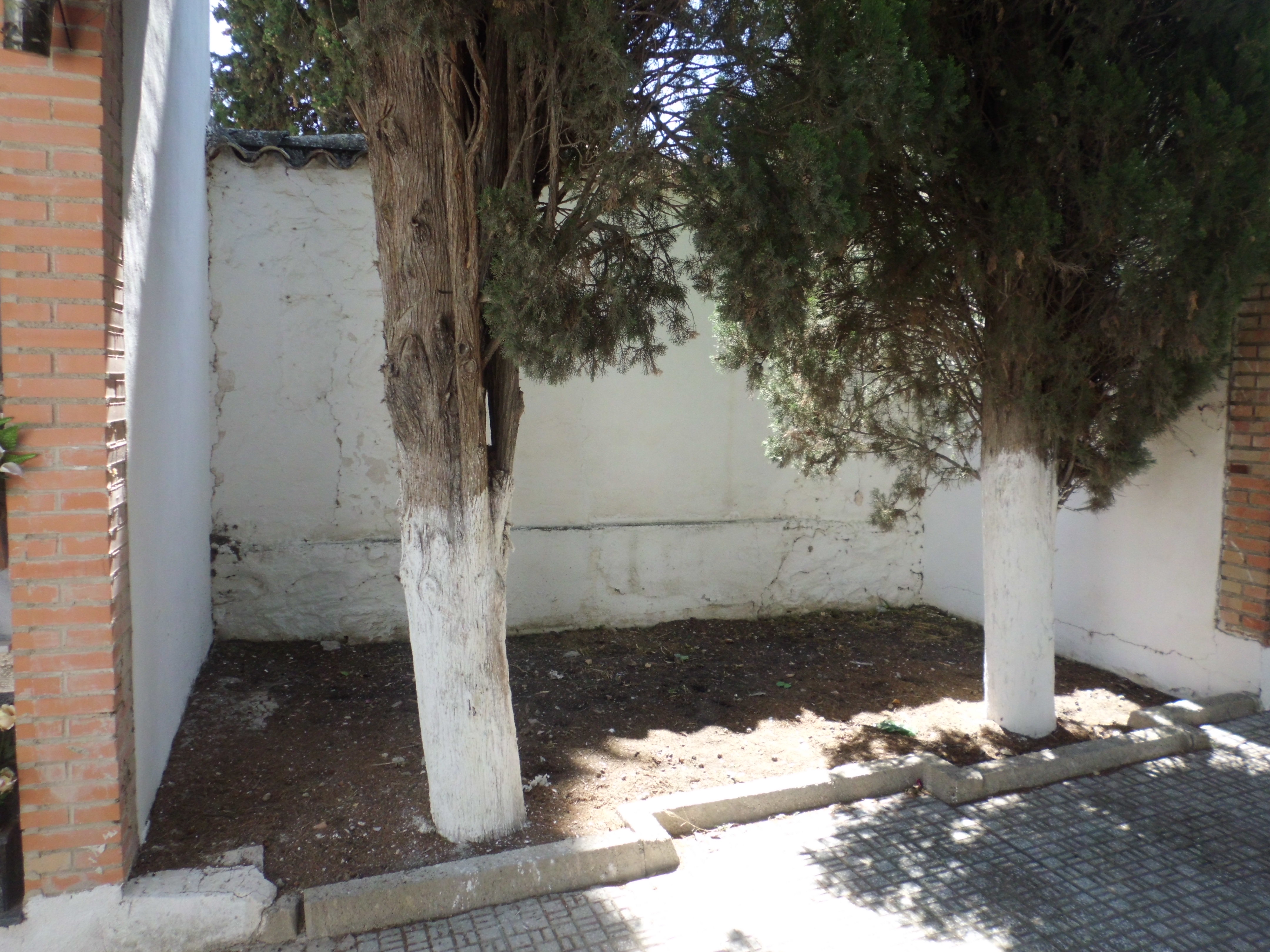 Fotografía del cementerio municipal de Jódar (Jaén) que he tomado con mi cámara digital CASIO EXILIM (14.1 MP 26 mm) la mañana del 2 de junio de 2016. En este espacio, se encontraba el cementerio civil o corralito.